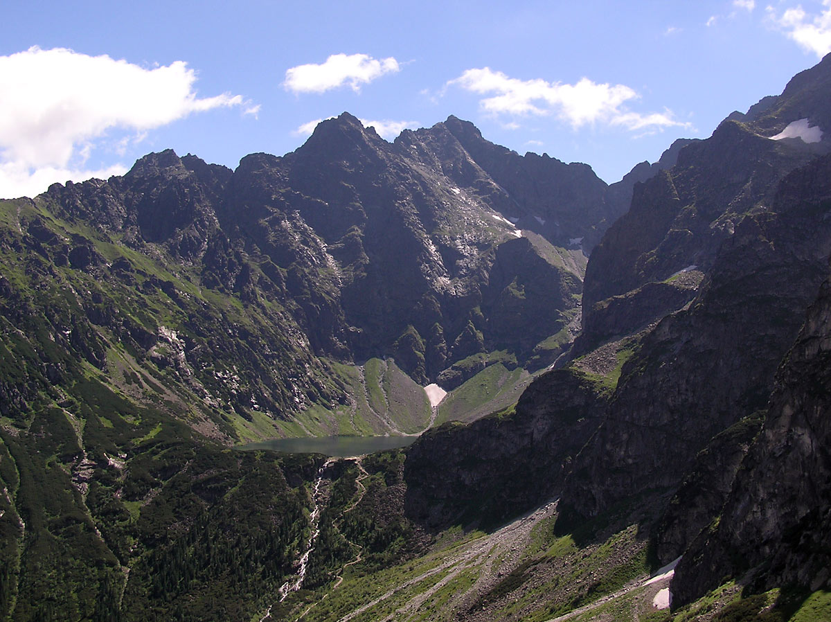 Niżnie Rysy i Rysy górujące nad Czarnym Stawem. W jego progu dobrze widoczna biała nitka Czarnostawiańskiej Siklawy i na prawo od niej zakosy szlaku wyprowadzającego na próg. W prawej, górnej części zdjęcia, na lewo od płata śniegu wierzchołek Kazalnicy, z którego zrazu w lewo a potem pionowo w dół do stawu, opada widoczny jako czarny profil, Filar Kazalnicy. W lewej części zdjęcia zielone siodło Białczańskiej Przełęczy i z niej grań idzie w prawo przez Żabi Szczyt Wyżni (poniżej niego, słabo widoczny Żabi Mnich) i Kopę Spadową ku Niżnim Rysom.